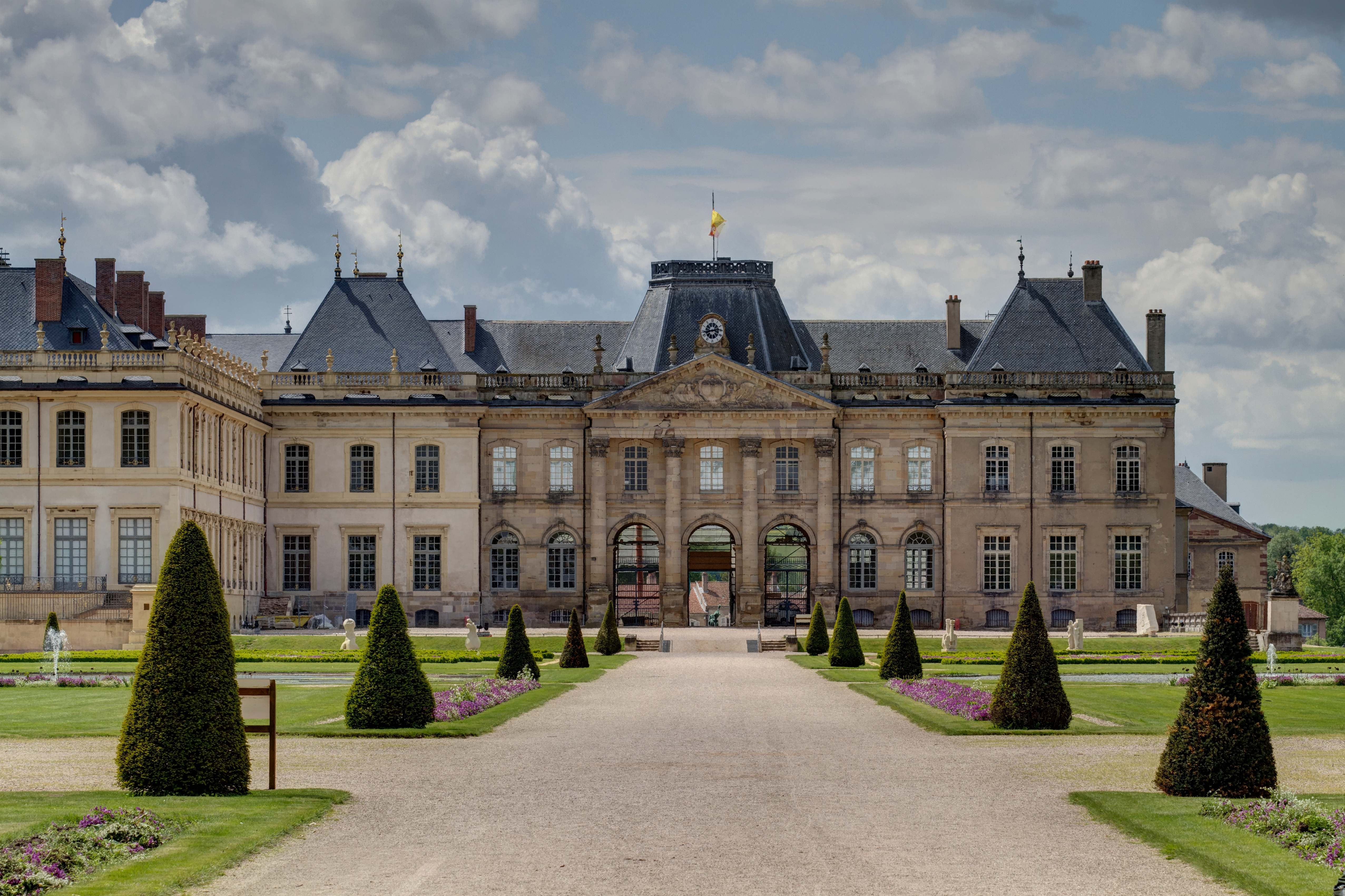 Chateau de Lunéville